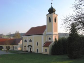 Alte Kapelle im Hellerhof Paudorf Sonstiges: ...